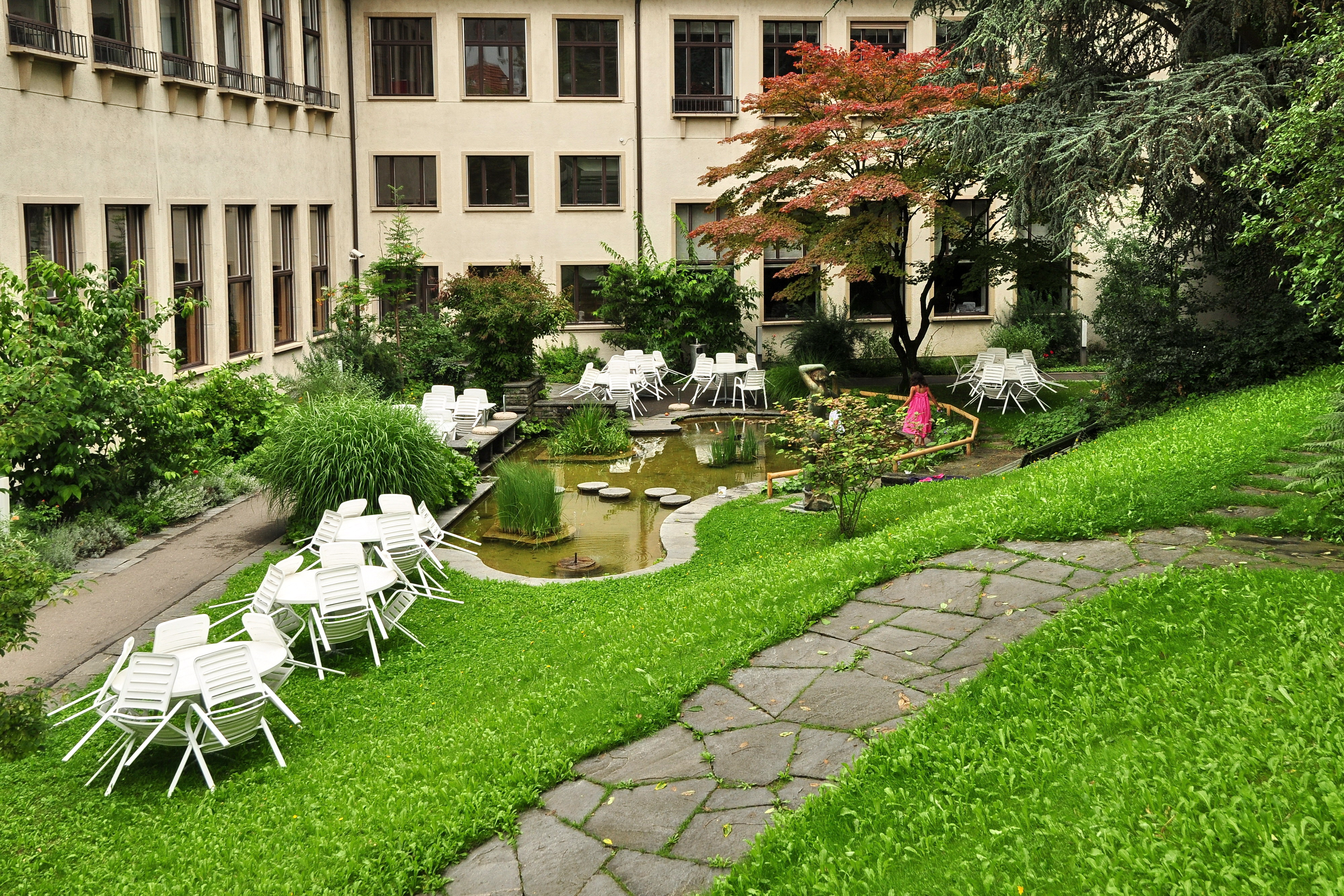 Haus der Farbe, Gustav-Ammann-Park in Zürich-Oerlikon (Switzerland)